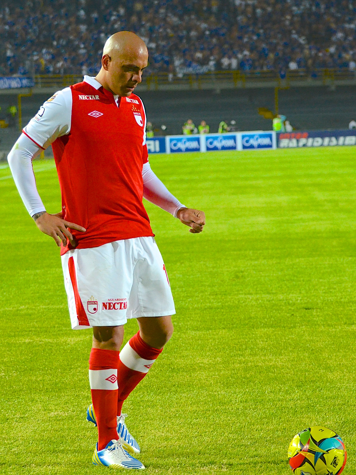 Superliga de campeones de Colombia 2012, partido de ida; Estadio El Campín de Bogotá